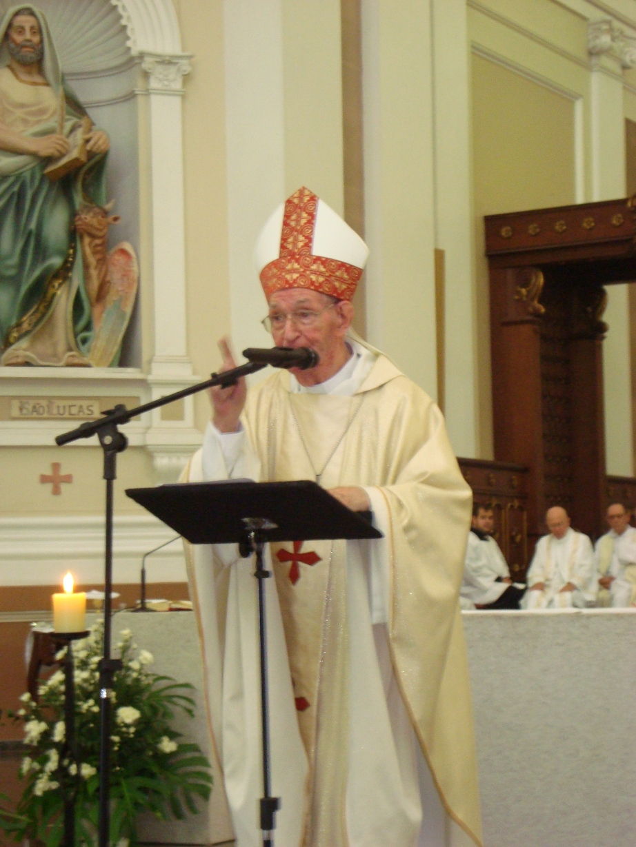 Altamiro Rossato, Arcebispo Emérito, Porto Alegre, Rio Grande do Sul, Brasil.